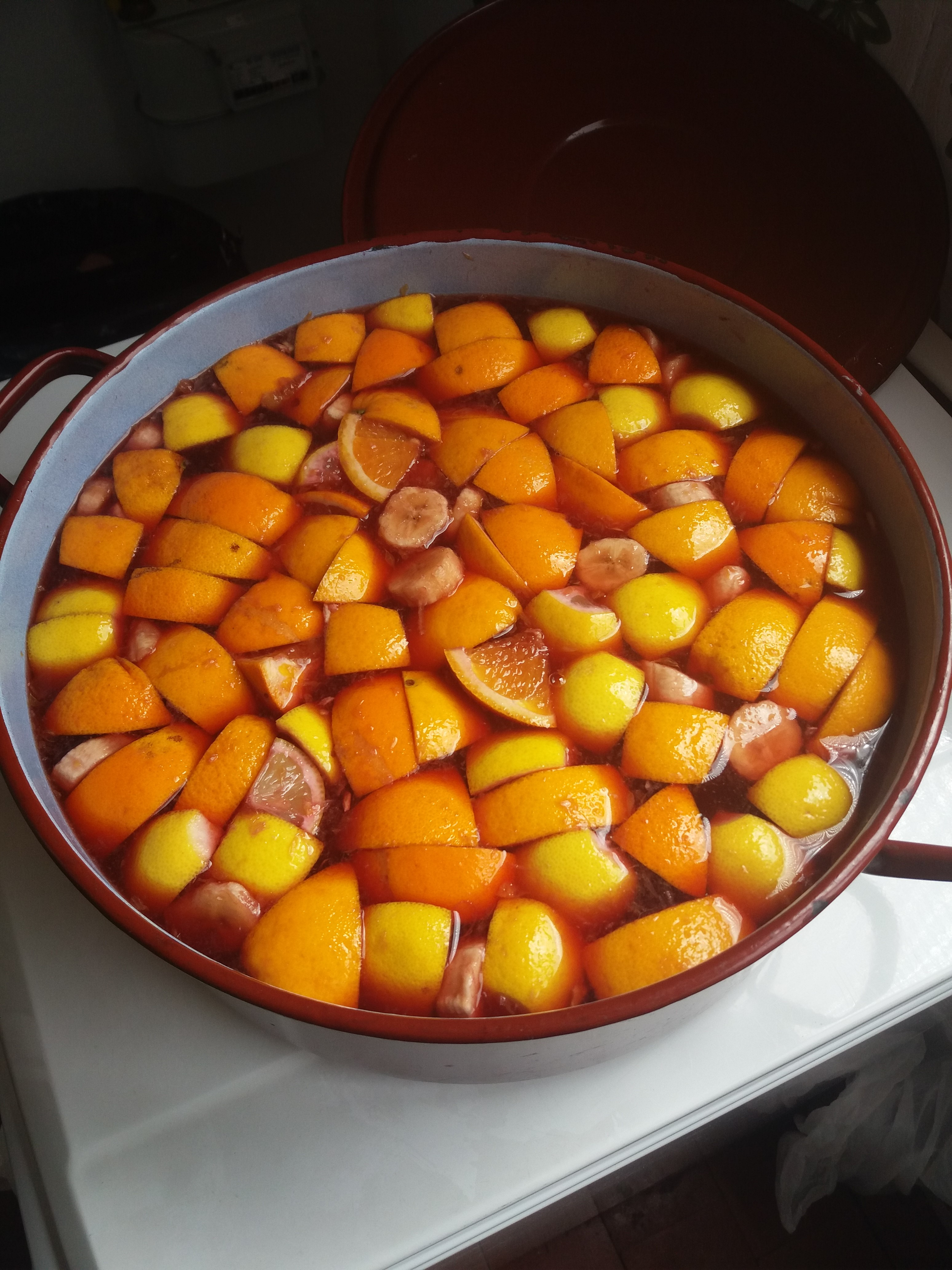 Bebida típica de Semana Santa en Valladolid